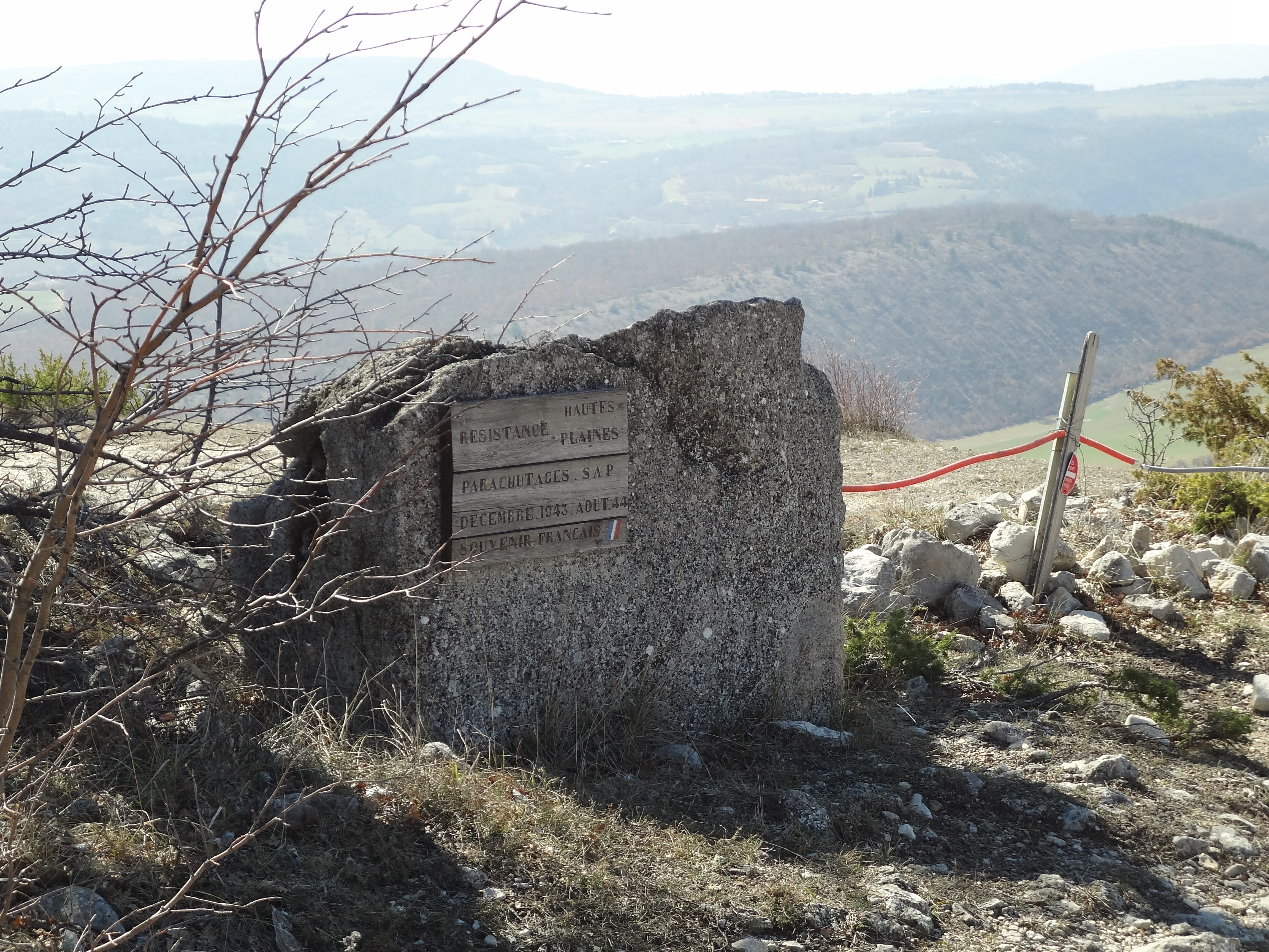 Plaque souvenir d'un terrain de parachutage SAP (Section atterrissage-parachutage, localement dirigée par René Char) à Mane, lieu-dit des Hautes-Plaines. Le terrain a ensuite appartenu à José Aboulker (un des organisateurs du débarquement à Alger, côté Résistance). L’inauguration a lieu en mai 1993. Source : Thérèse Dumont, association Basses-Alpes 39-45.